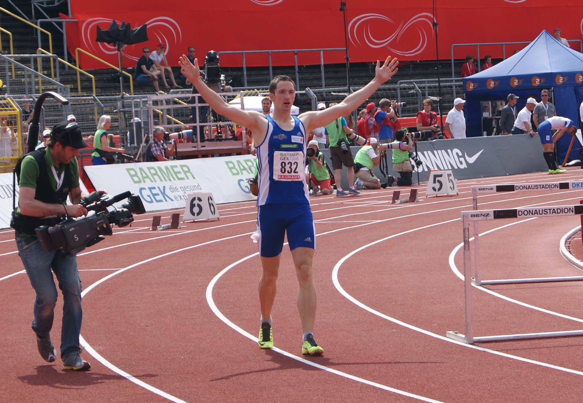 Silvio Schirrmeister, Deutscher Meister 2013, 400 m Hürden, 2013-07-07